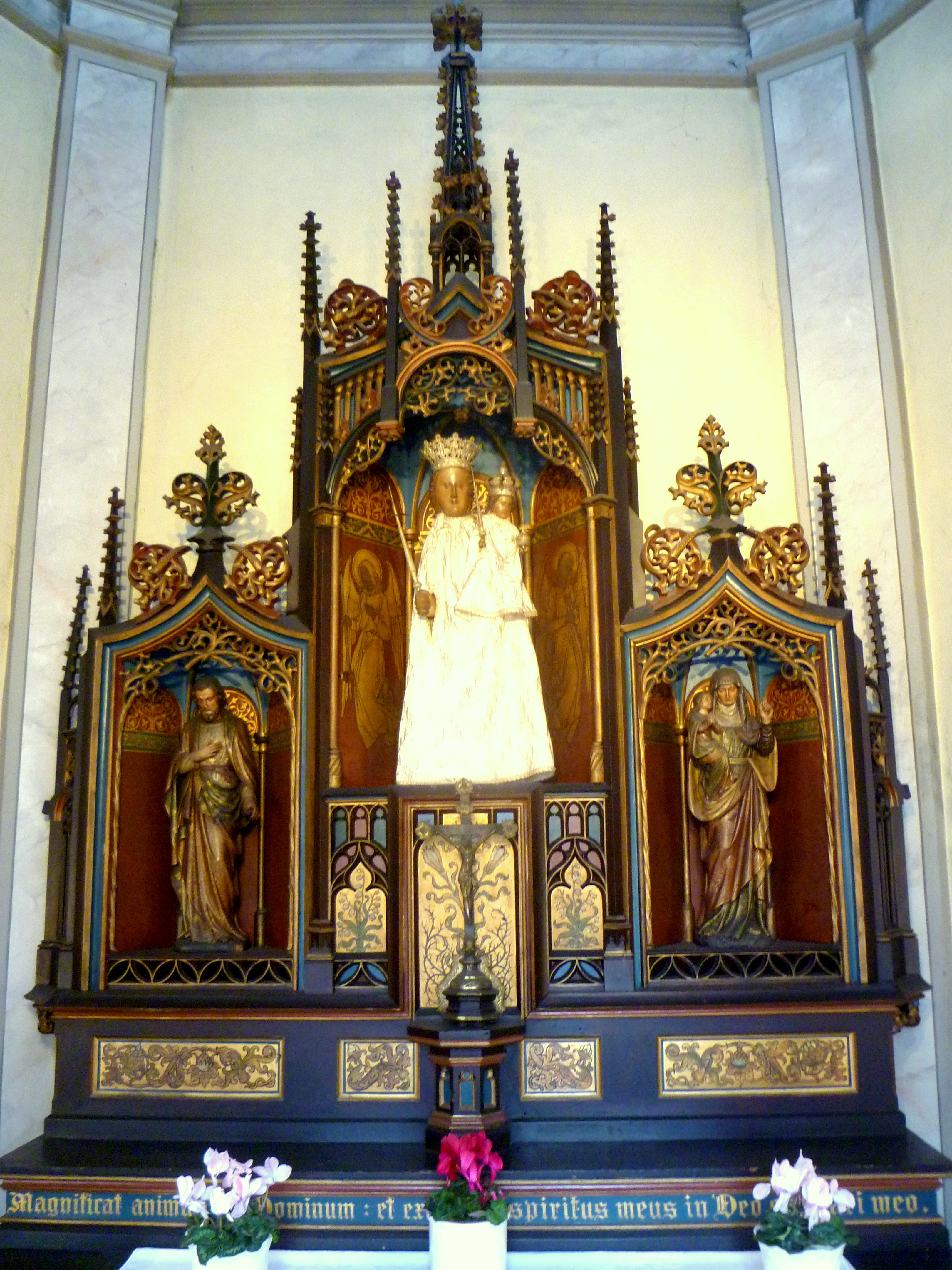 Altaraufbau Roskapellchen Aachen